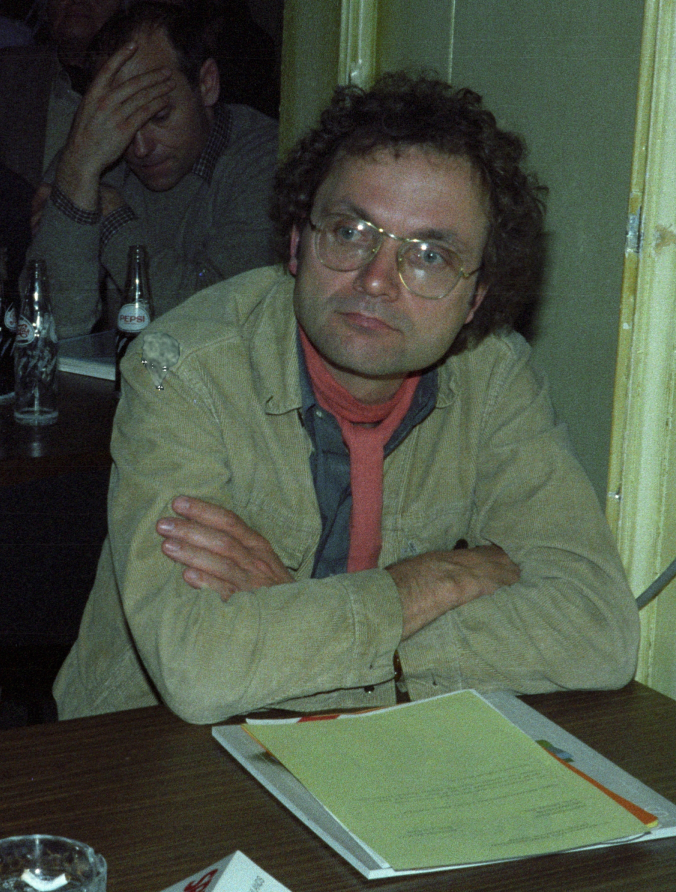 Porträt Klaus Geldmacher, Künstler, Teilnehmer einer SPD-Kreisdelegiertenversammlung in Hamburg-Nord